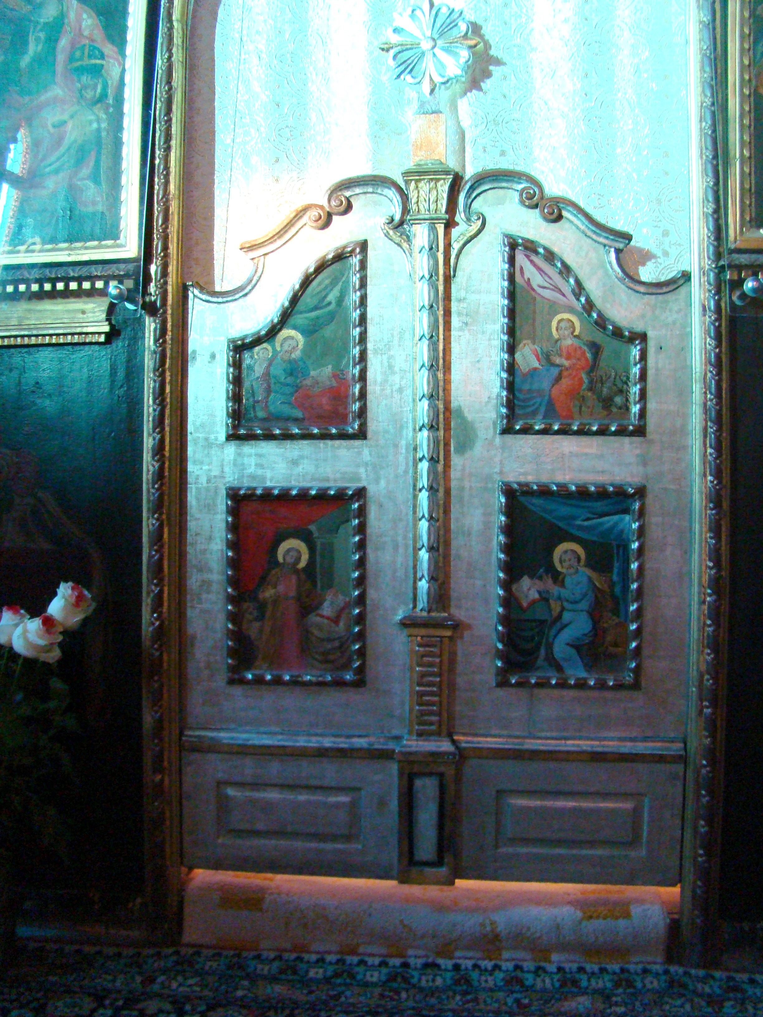 Biserica Ortodoxă Sf. Treime din Cluj